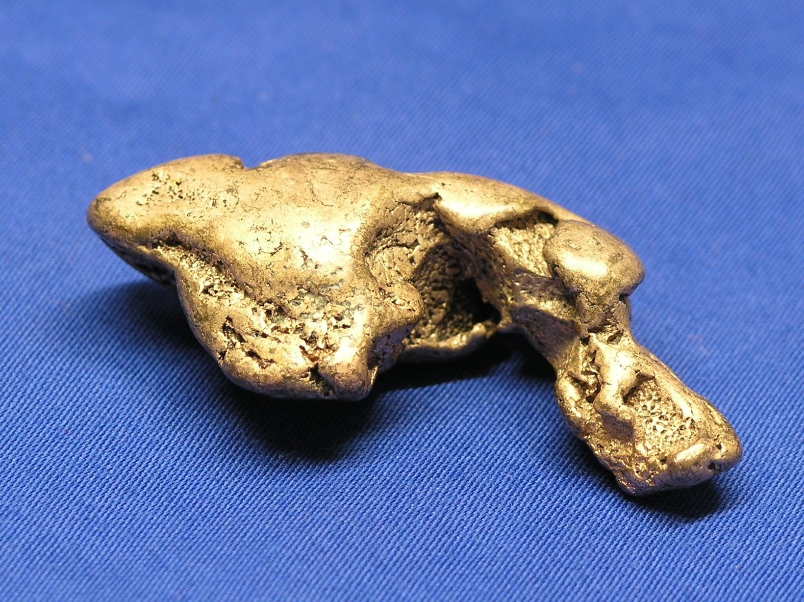 Kupfer-Nugget, Masse etwa 25 g, grösste Ausdehnung 44 mm